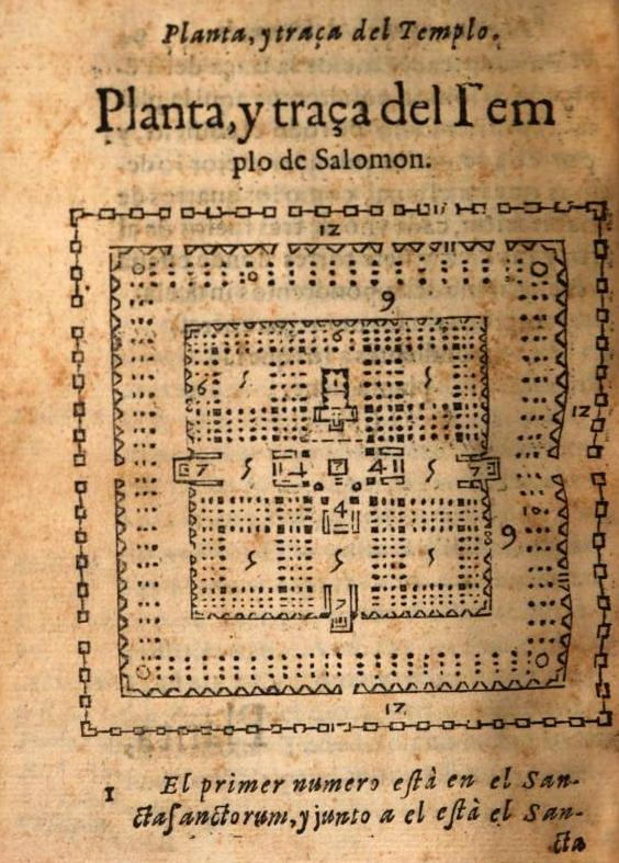 Martín Esteban - Grabado del Templo de Jerusalén